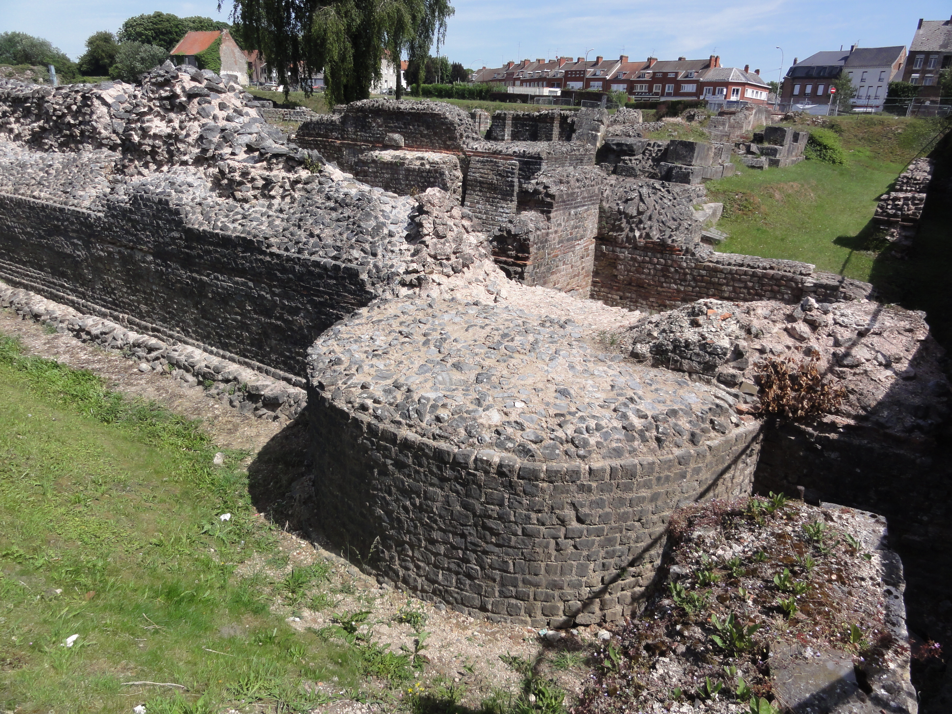 Bavay (Nord, Fr) vestiges cité gallo-romaine. Vue vers le nord. L'église N-D de l'Assomption est sur la droite de la photo.